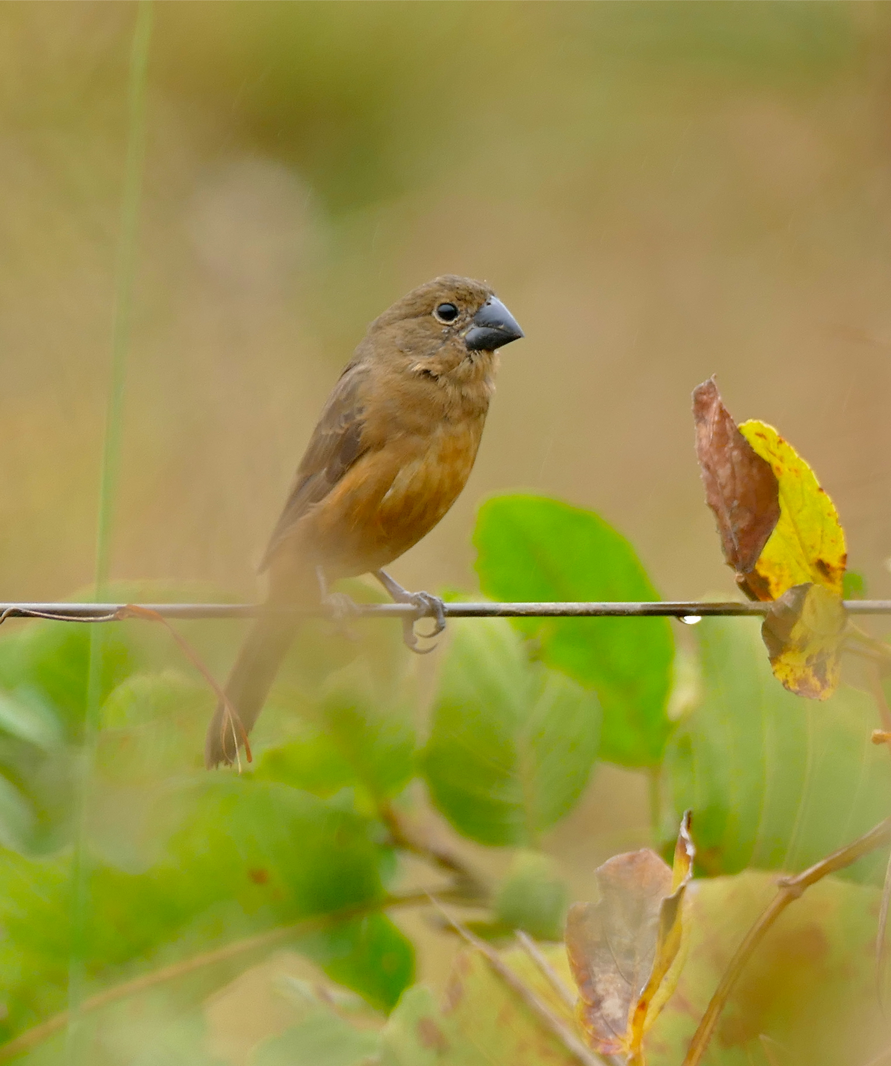 Transpantaneira, Poconé, Mato Grosso, BRAZIL